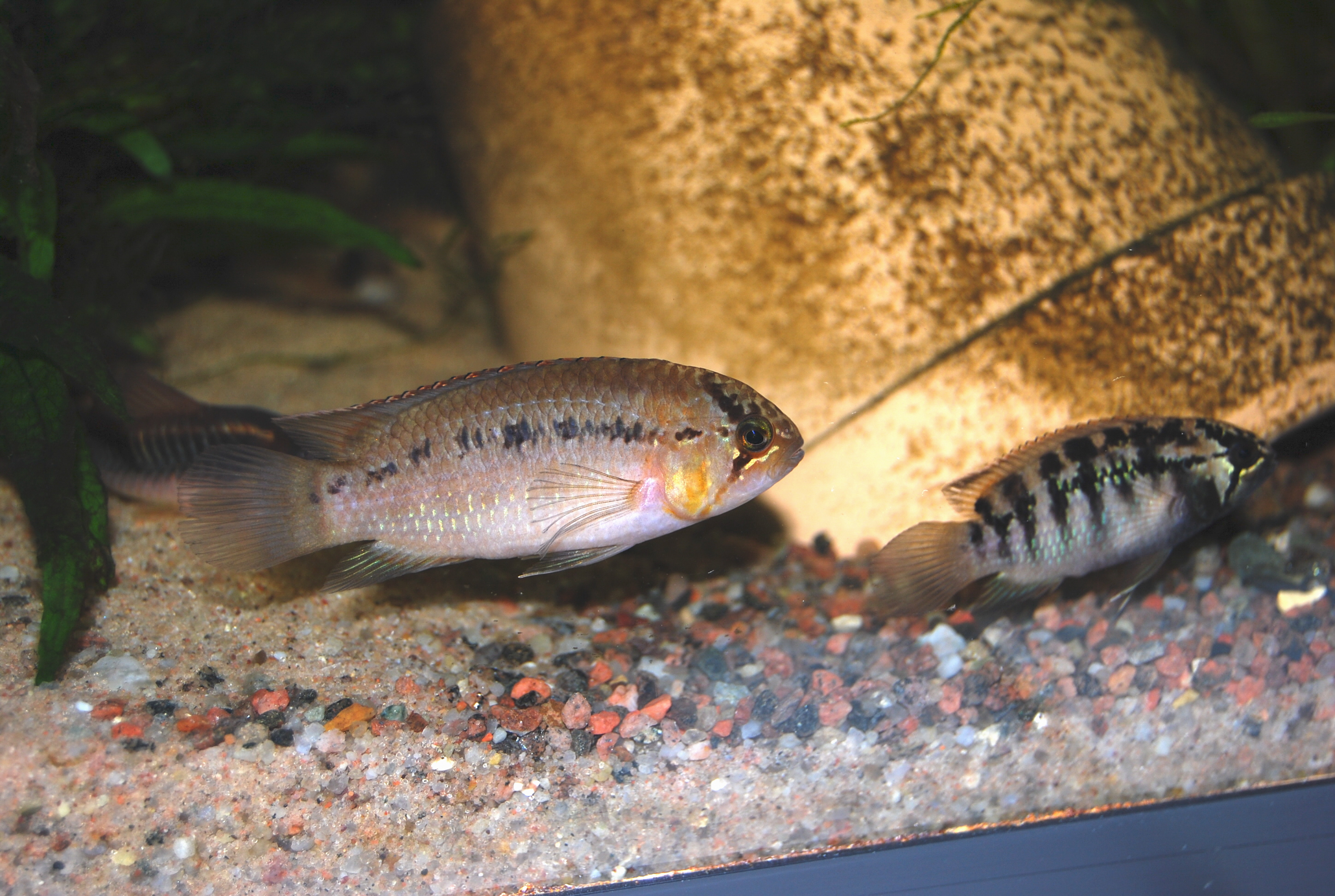 Par av Ivanacara adoketa - a couple of Nannacara adoketa